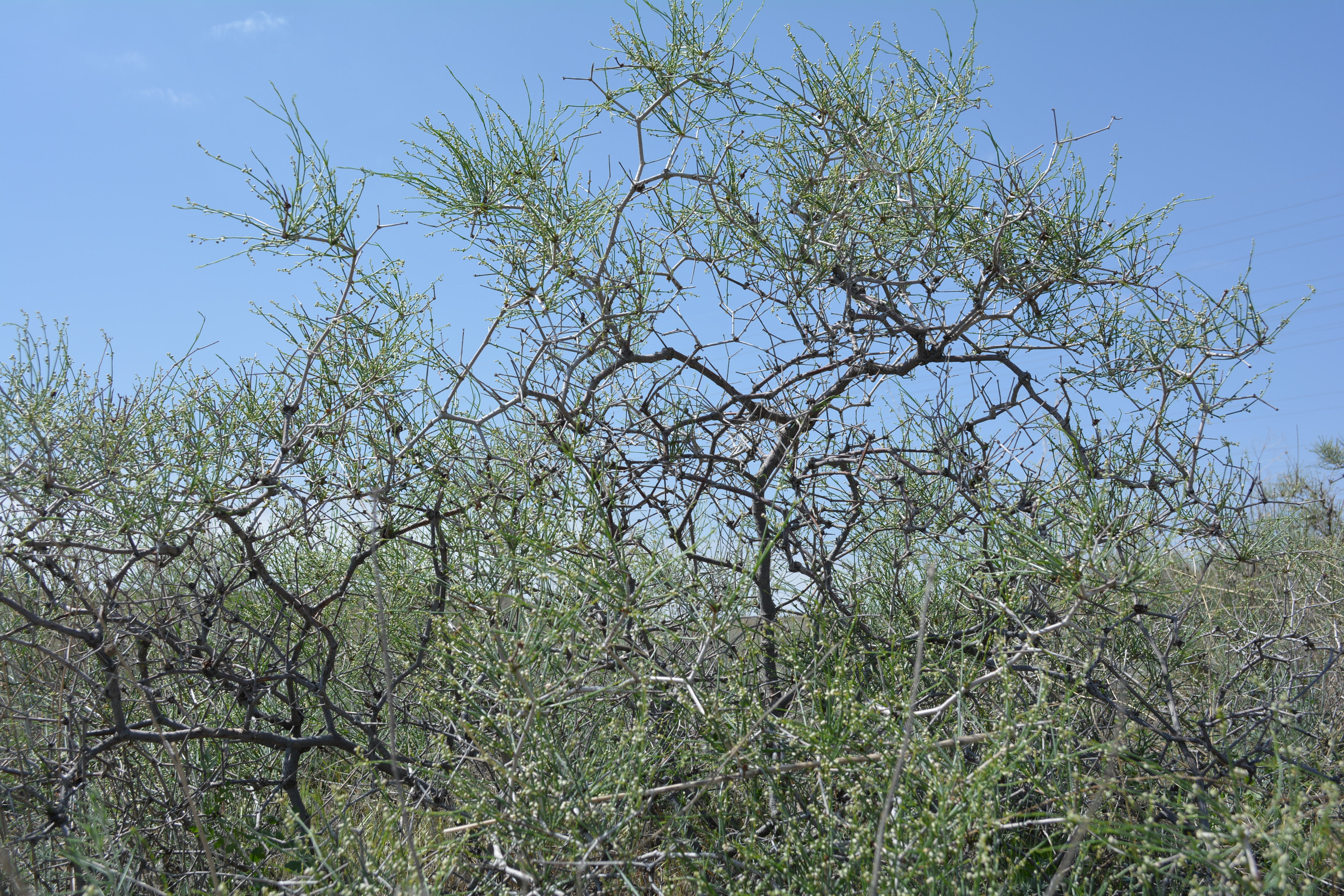 Государственный заказник «Гораванские пески»